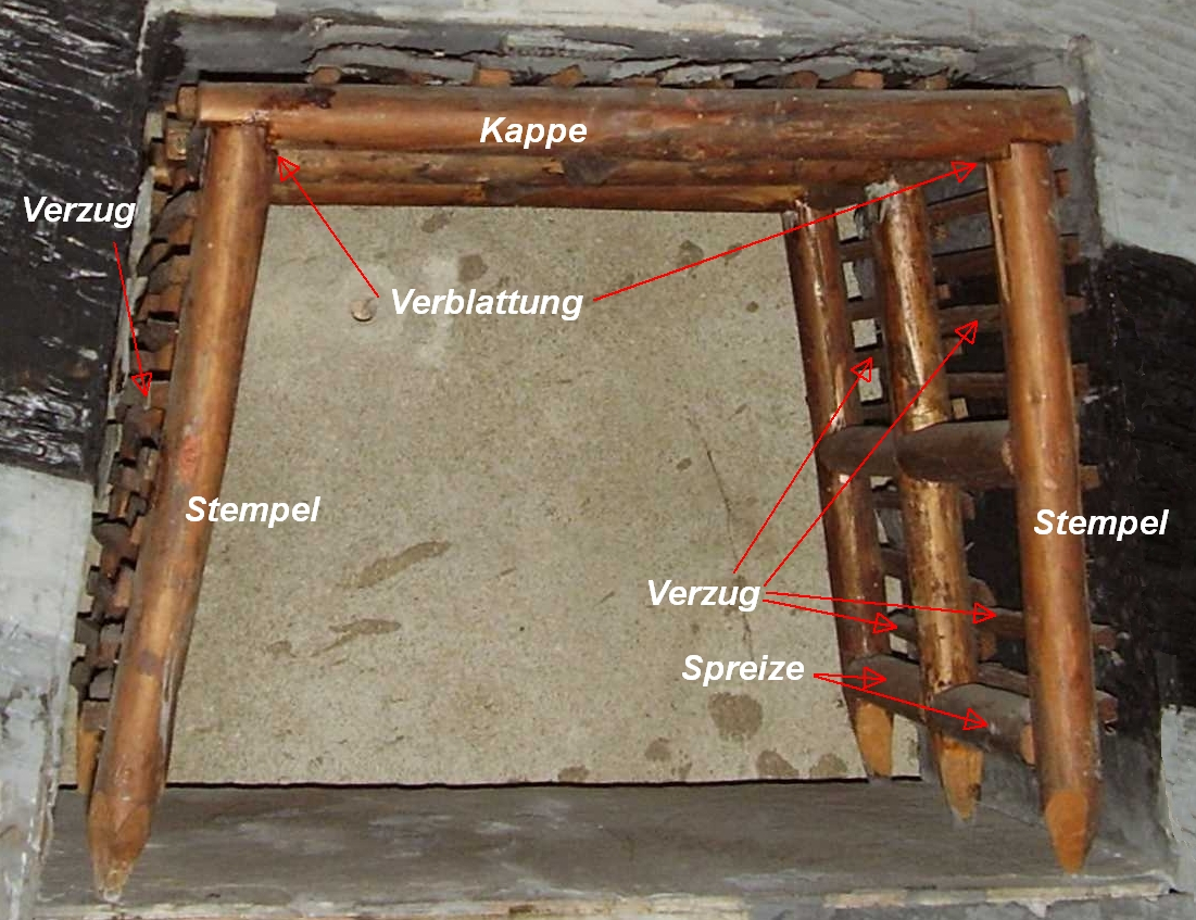 Deutscher Türstock (Modell) mit Bezeichnung der einzelnen Ausbauelemente.